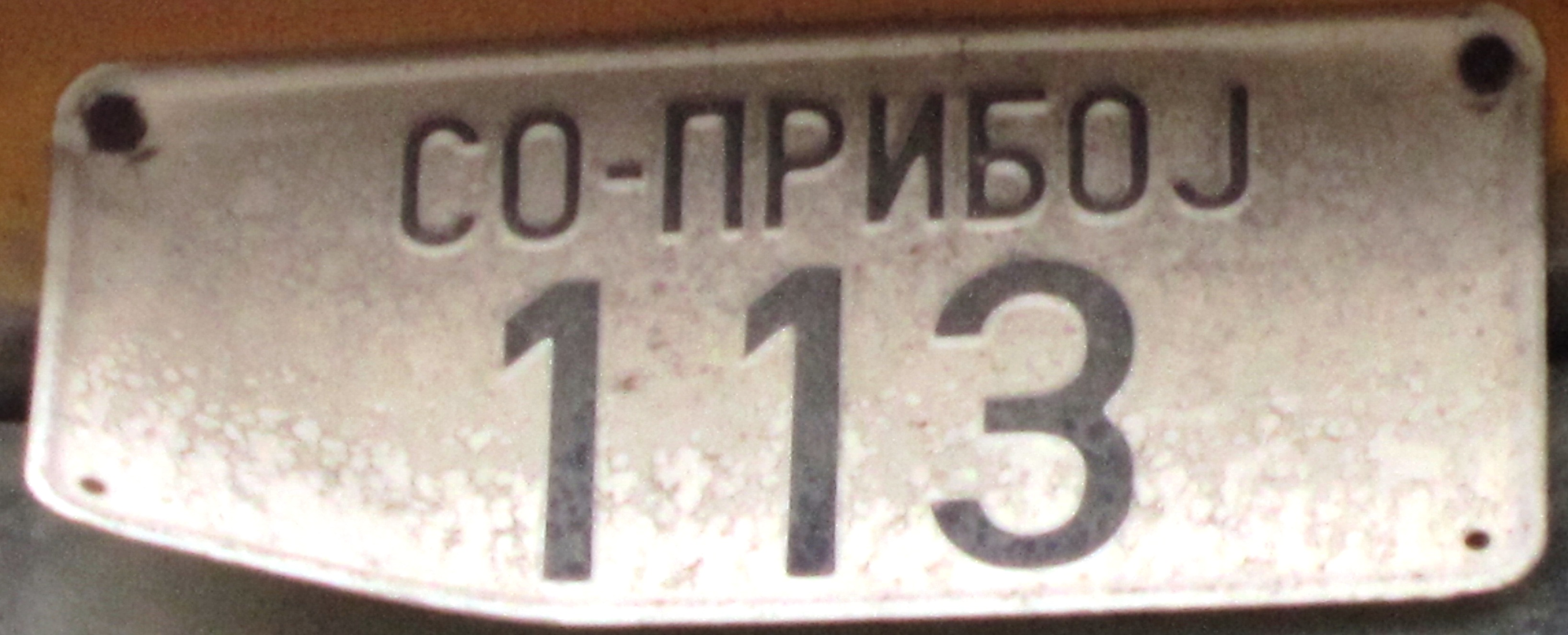 Servië oud kentekenplaat voor langzame voertuigen